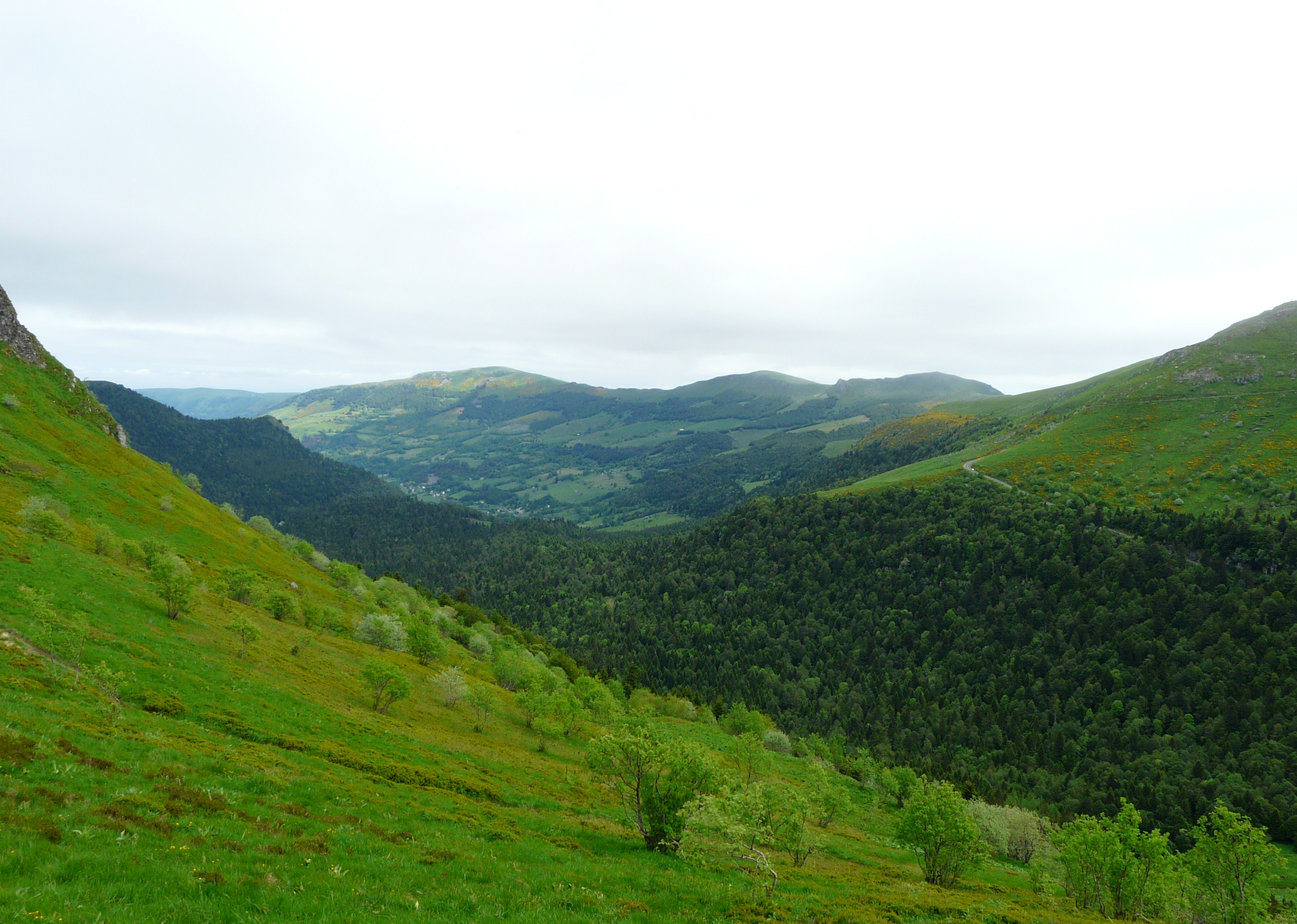 La vallée du Mars vue depuis la route départementale 17, sous le col de Redondet, Le Falgoux, Cantal, France.